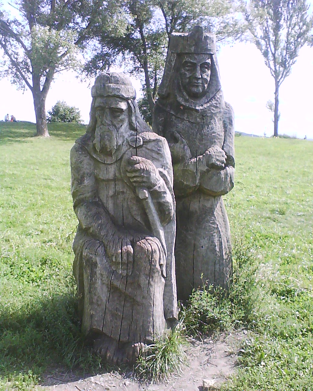 Гарадзішча. г. Браслаў This is a photo of Belarusian heritage monument. Reference number: 213В000174 ( WLM)